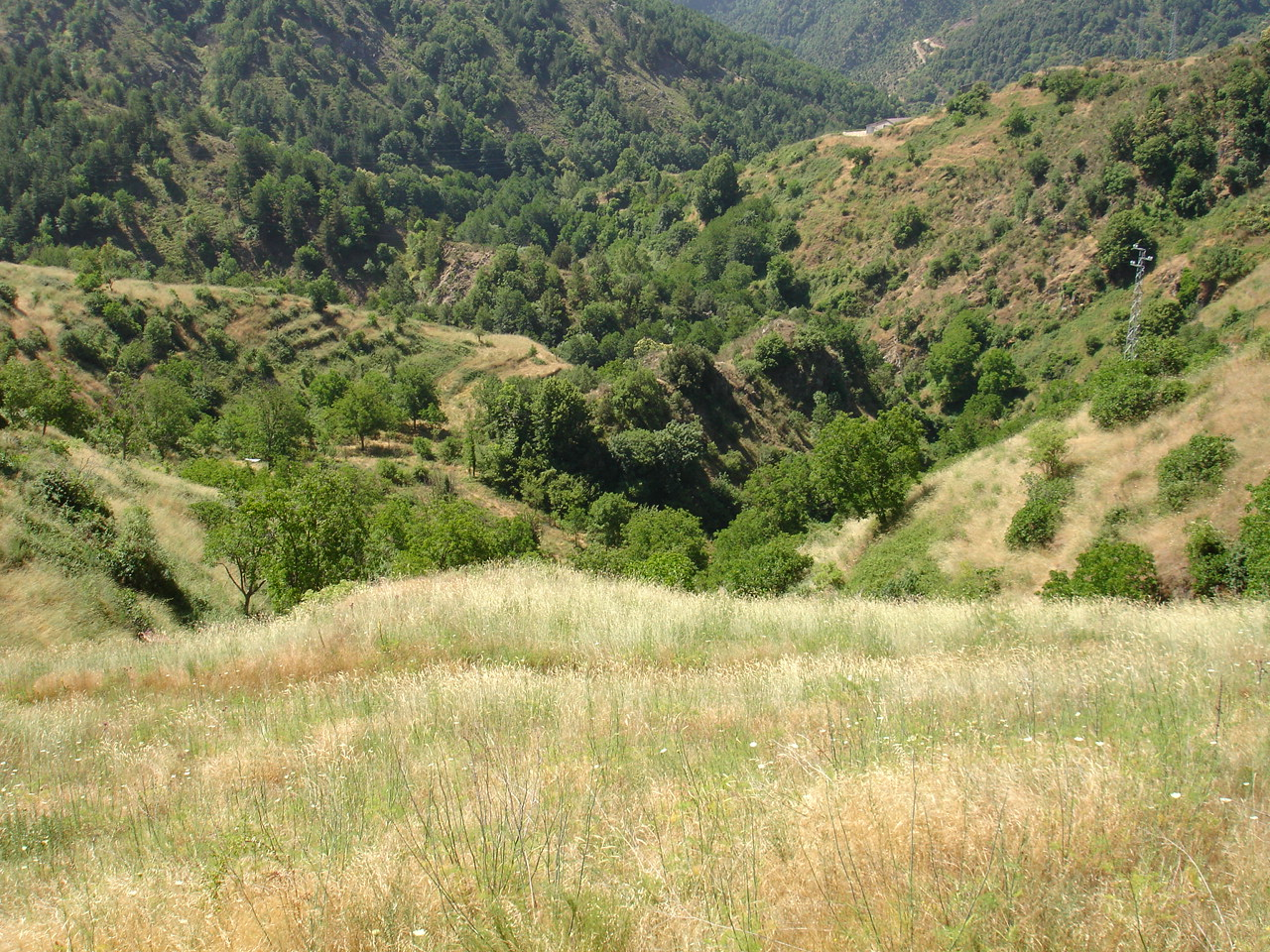 Antichi orti nei pressi dell'Abbazia Florense